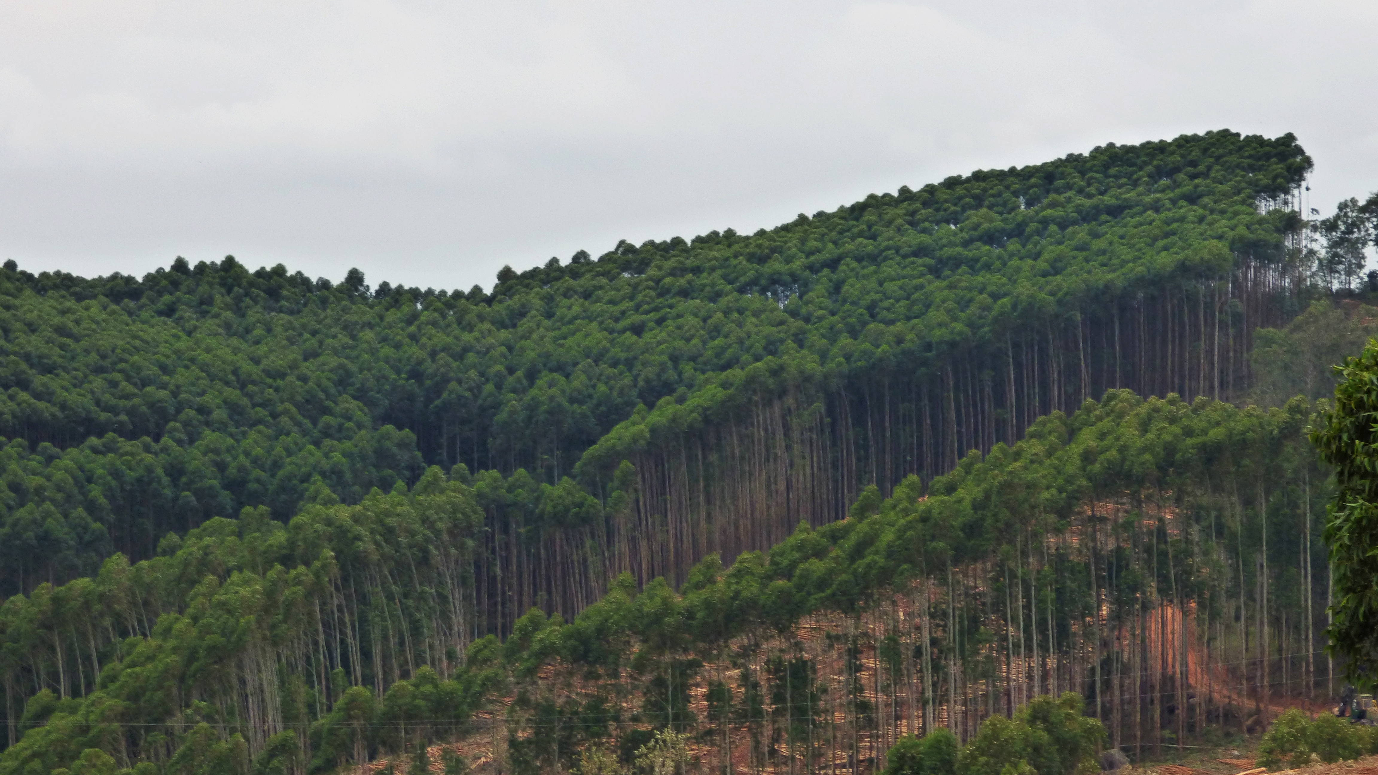 PLantação de Eucaliptus.